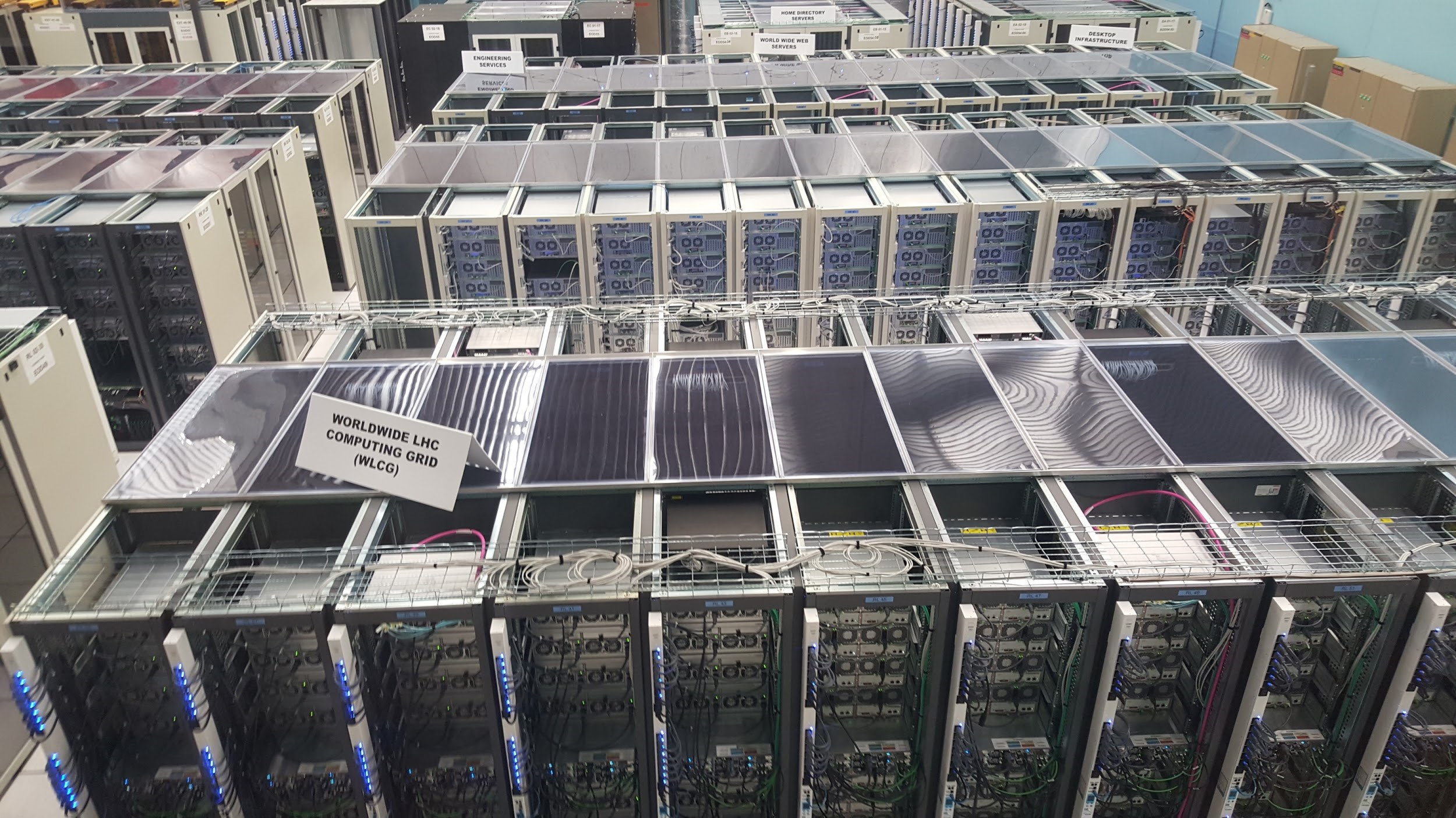 מרכז המחשוב של CERN אליו מגיע המידע מגלאי האטלס